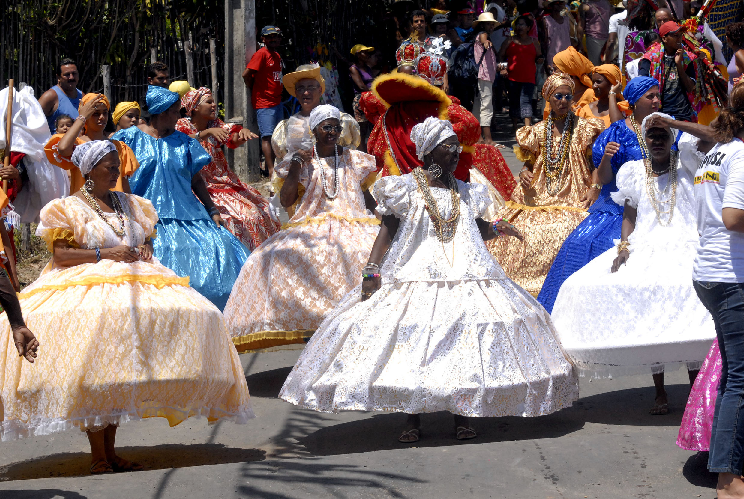 Encontro estadual de maracatus, Carnaval do Recife, Pernambuco, Brazil